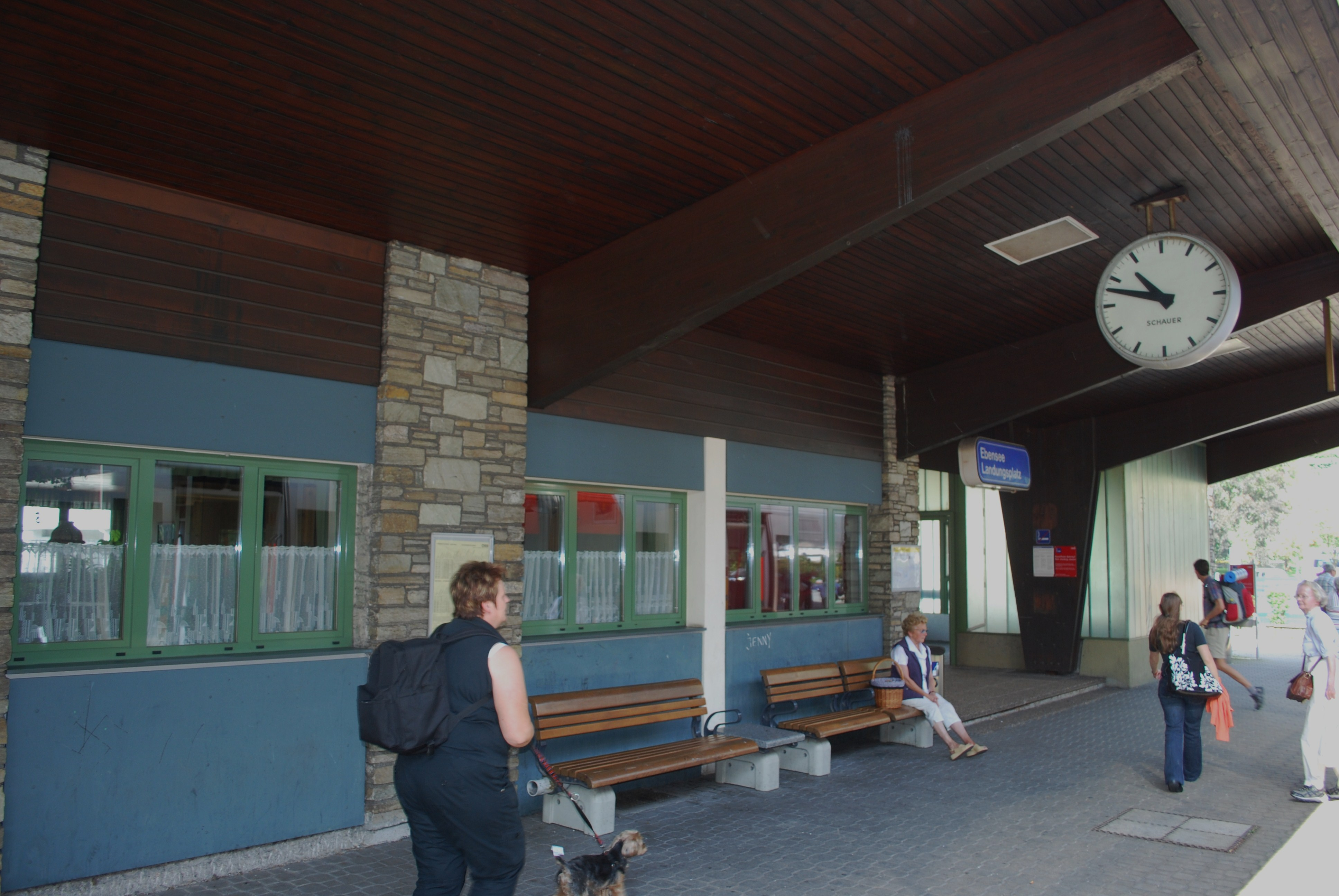 Haltestelle Ebensee Landungsplatz